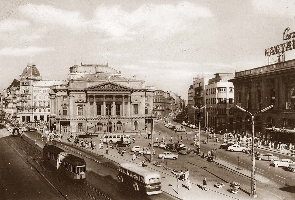 A "régi" felrobbantott Nemzeti Színház - Budapest (1950's), a Blaha Lujza téri Népszínház épülete.